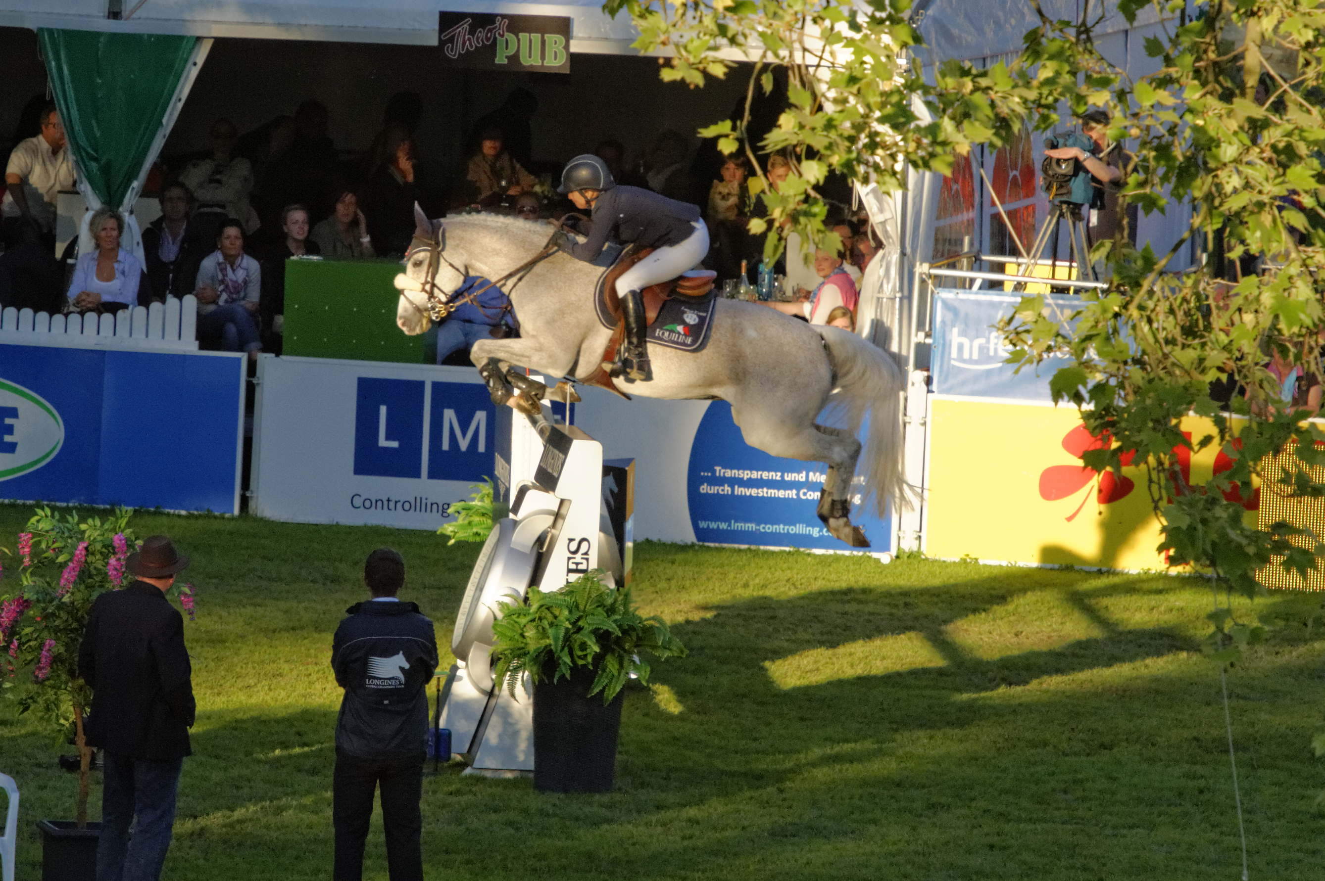 Internationales Pfingstturnier Wiesbaden 2013